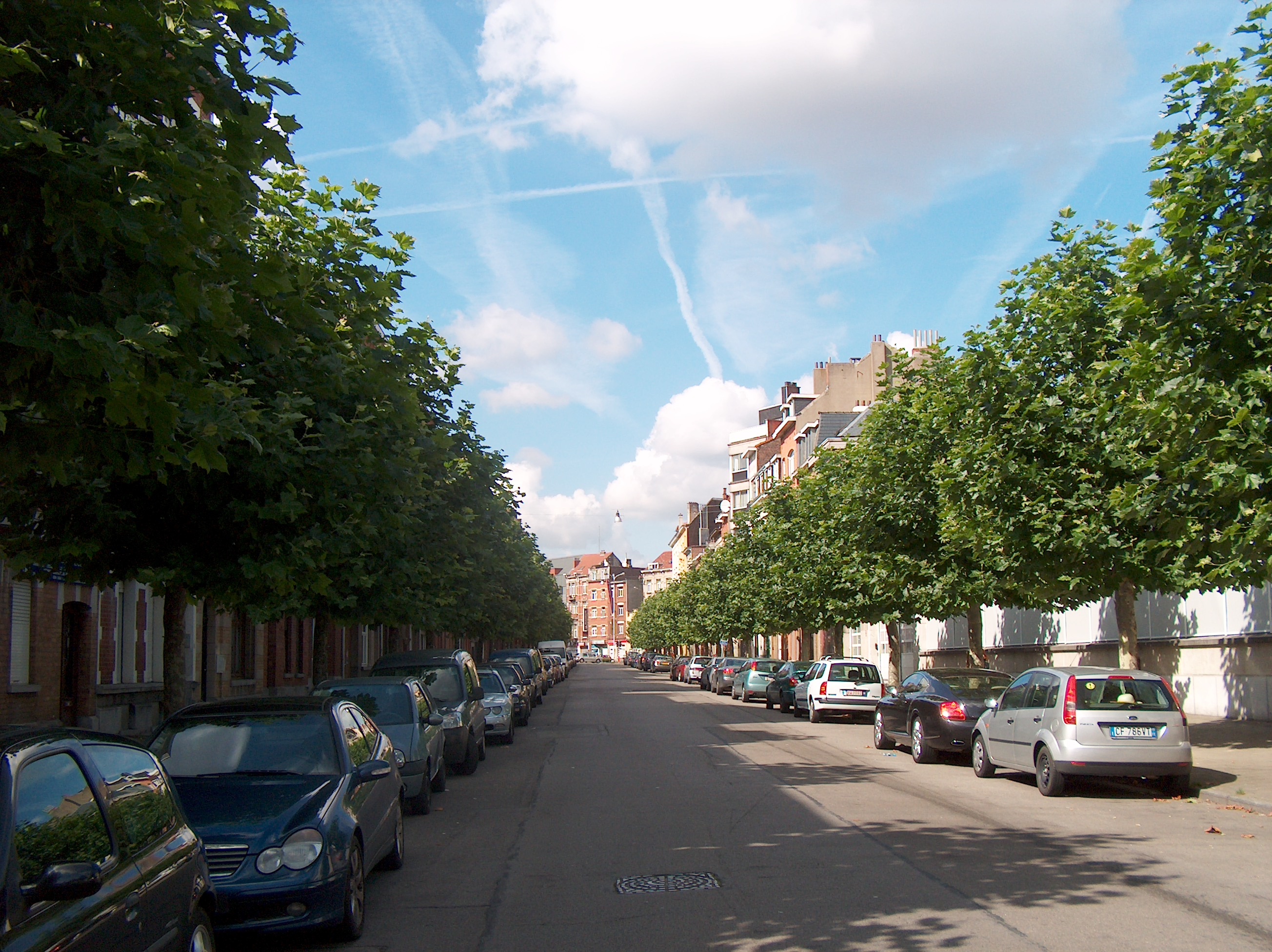 Bruxelles, Schaerbeek, avenue de la Topaze